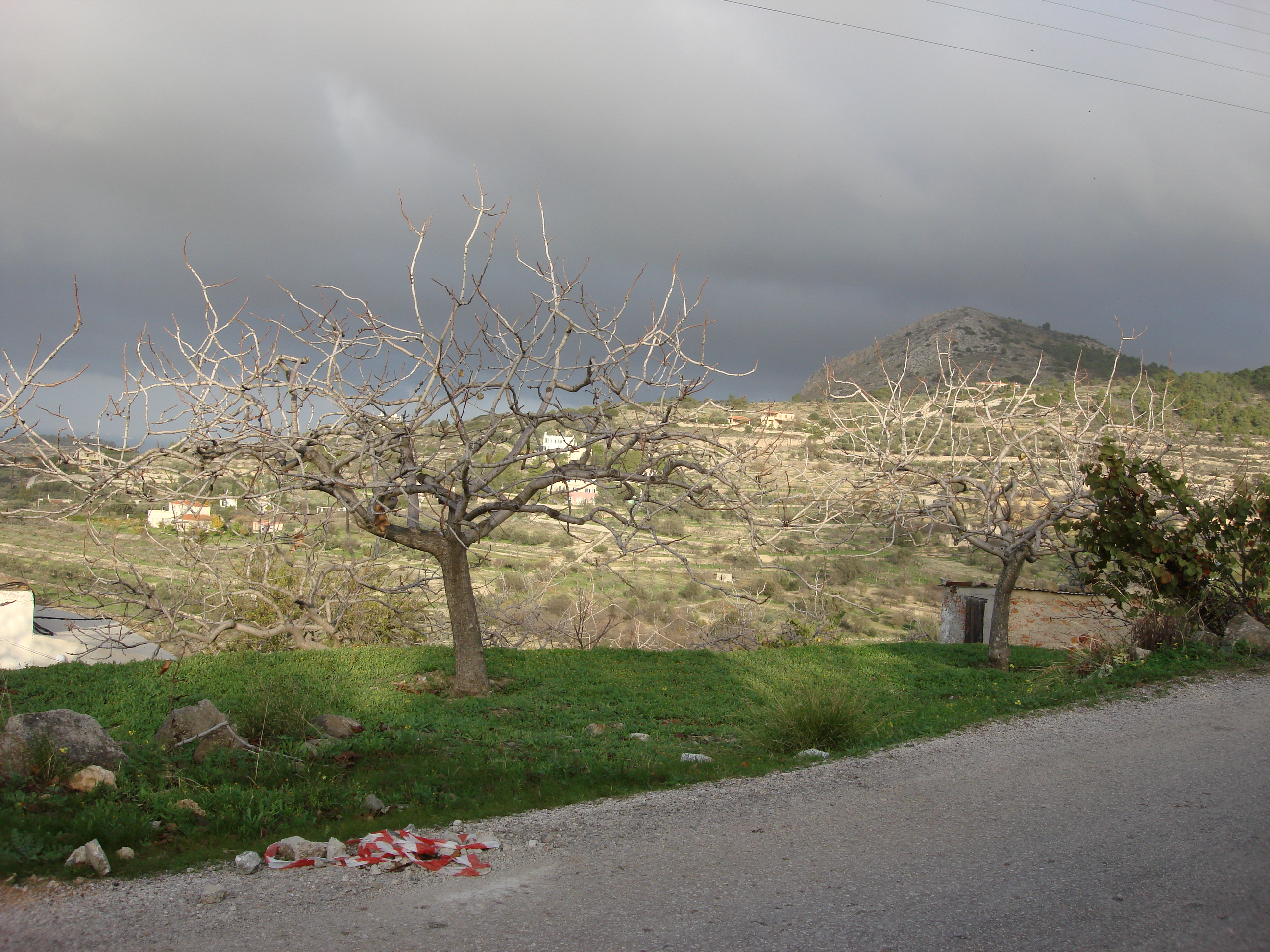 Aegina island - Bike ride